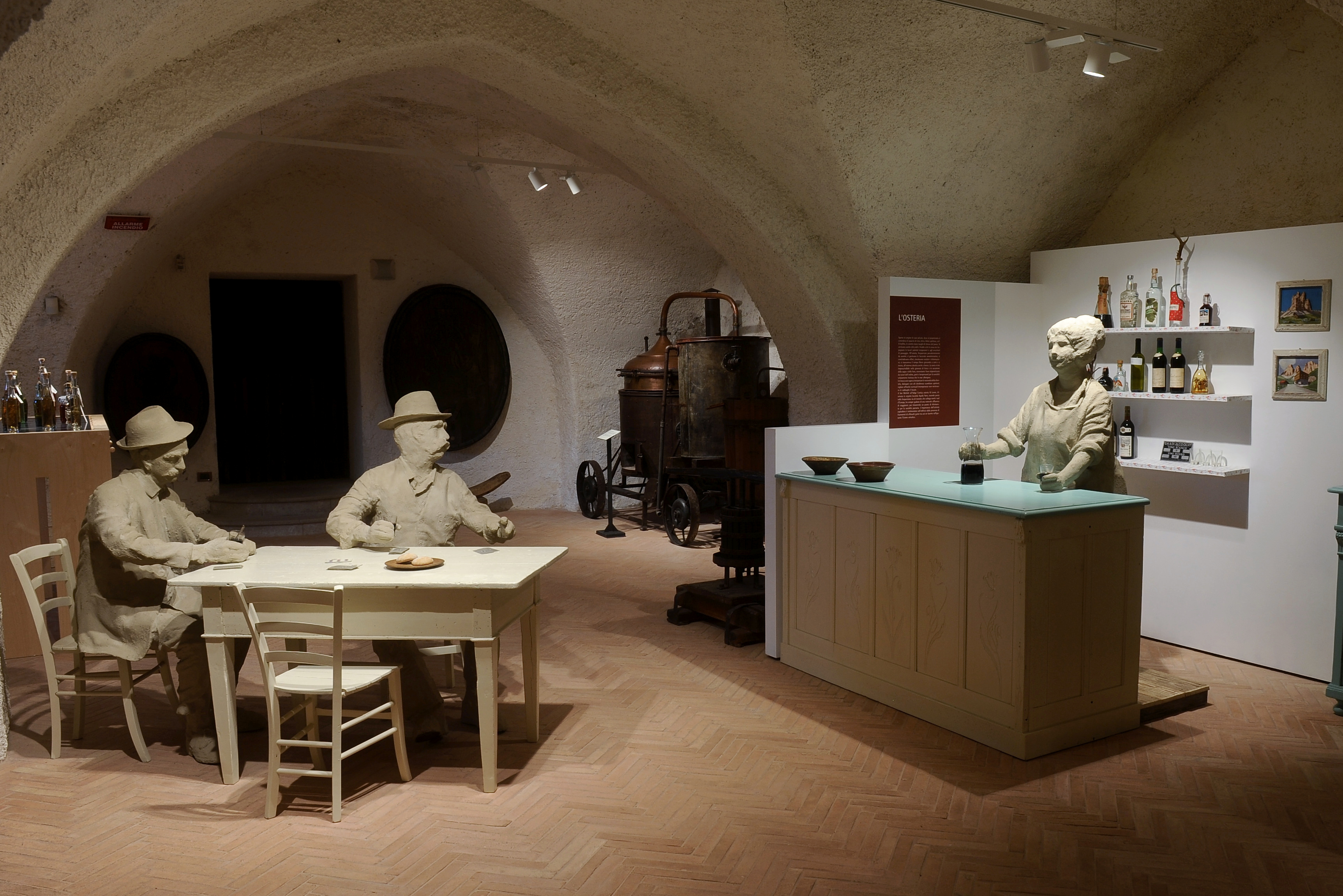 Particolare dell'osteria nella sala Enologia presso il Museo degli Usi e Costumi della Gente Trentina